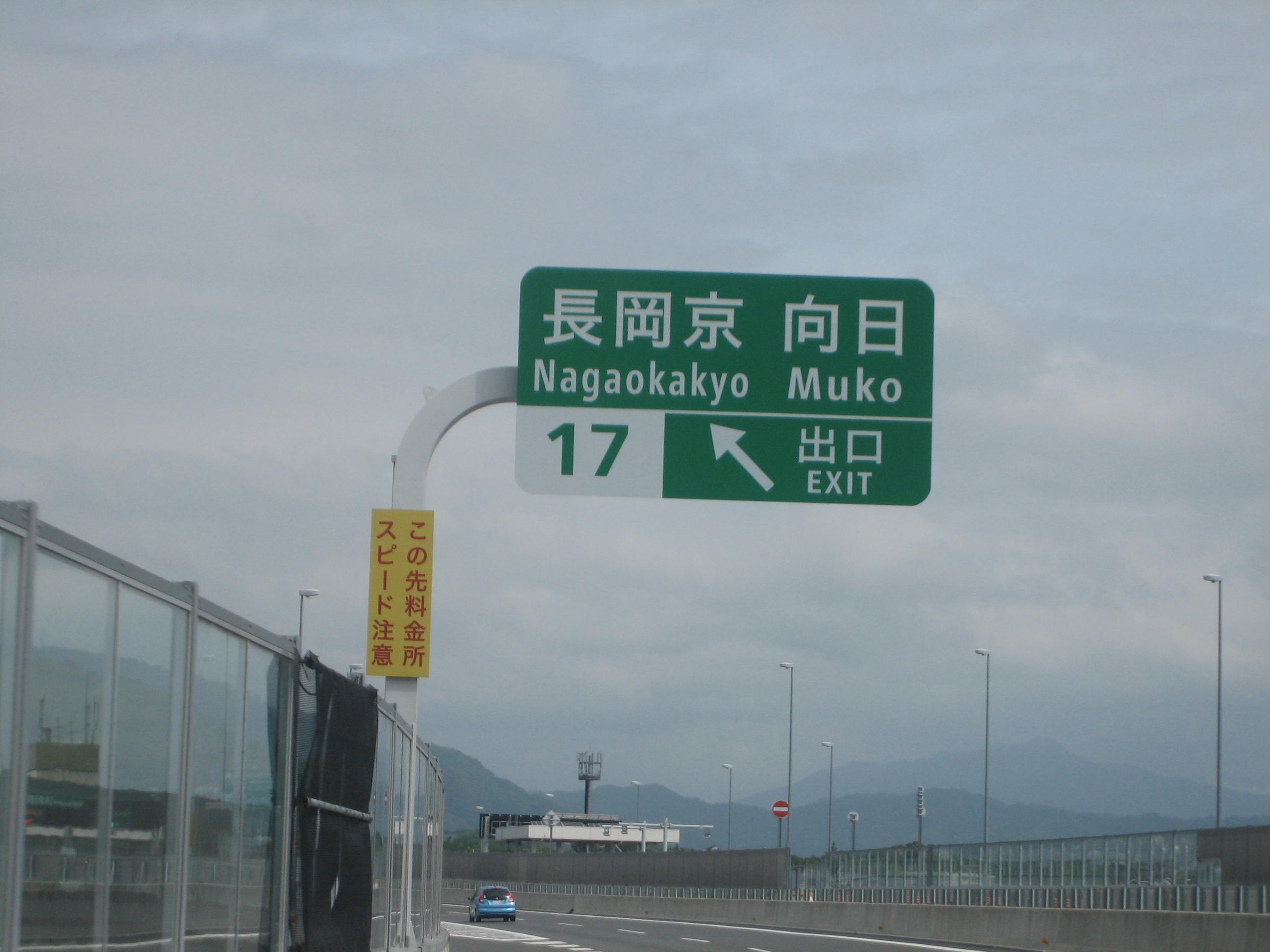 長岡京IC